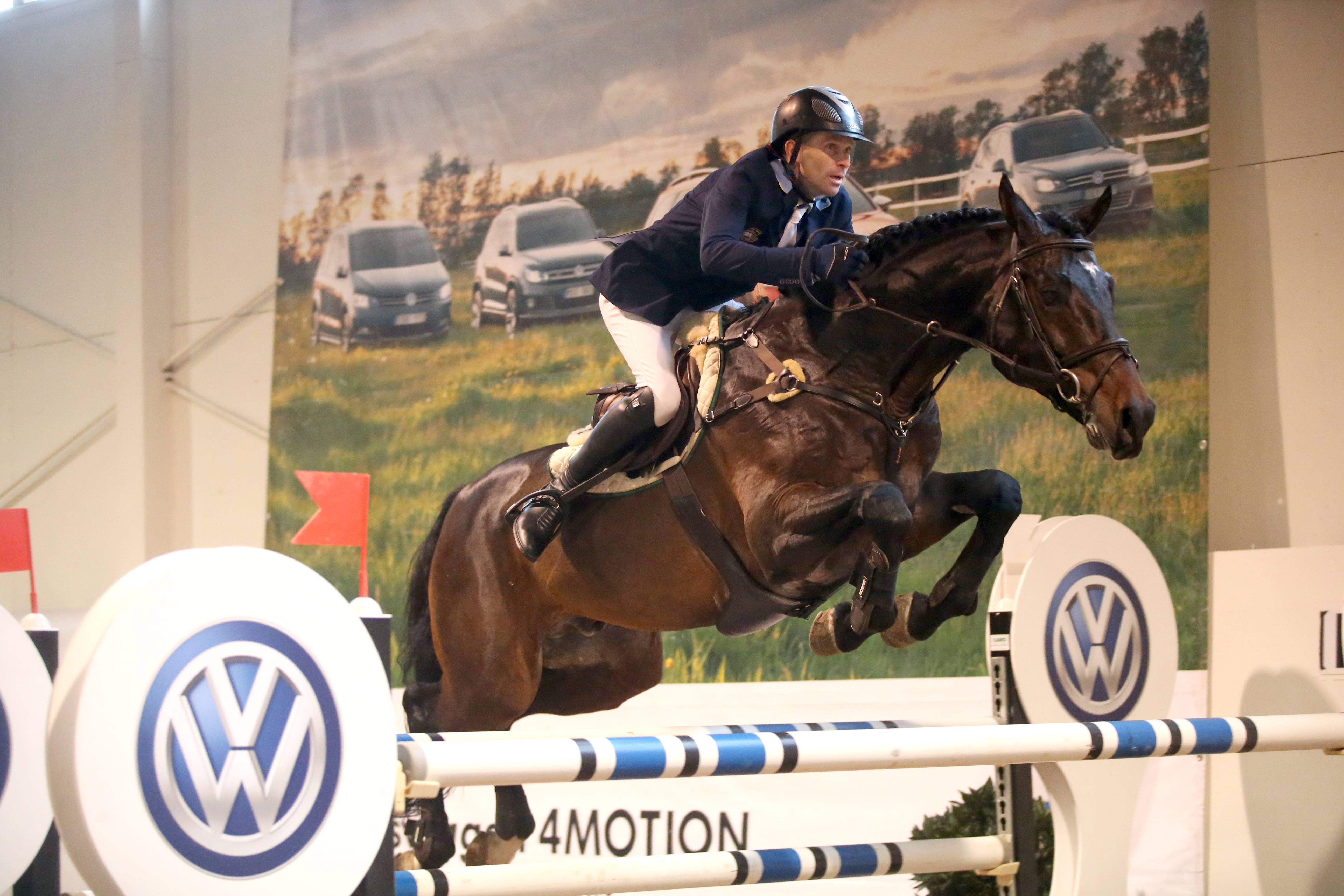 Södertälje VW-Grand Prix Niklas Arvidsson och Click and Cash vann VW-Grand Prix-finalen 2014 Photo: Roland Thunholm Code:718 35